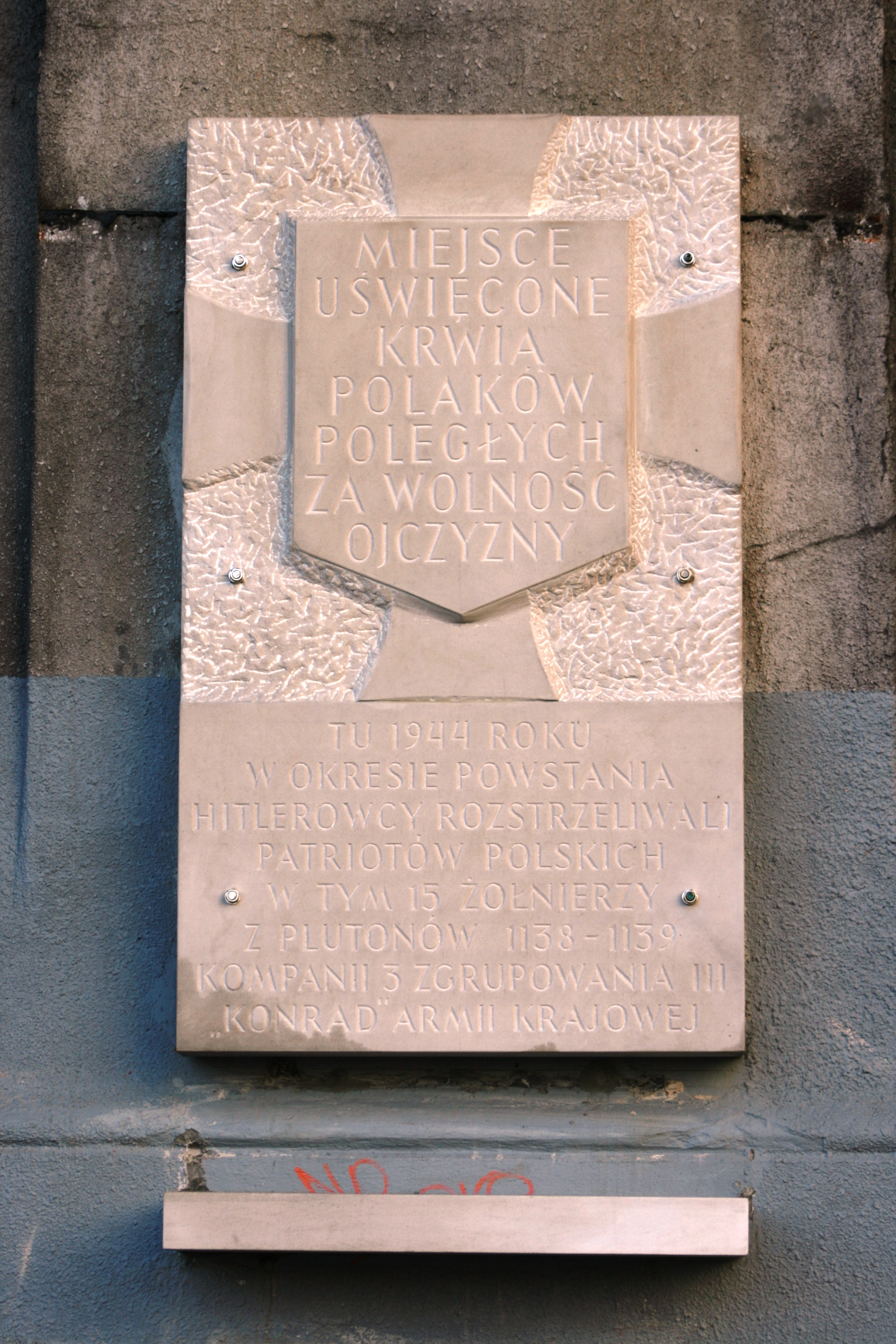 Nowa tablica odsłonęta w październiku 2012 roku